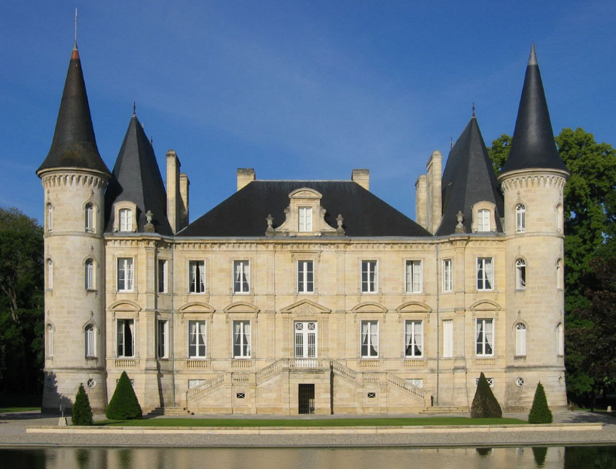 Le château Pichon-Longueville Baron à Pauillac, Gironde